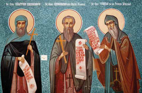 Schitul Sfantul Ilie, Sasenii Noi, Buzău, pictură din biserică